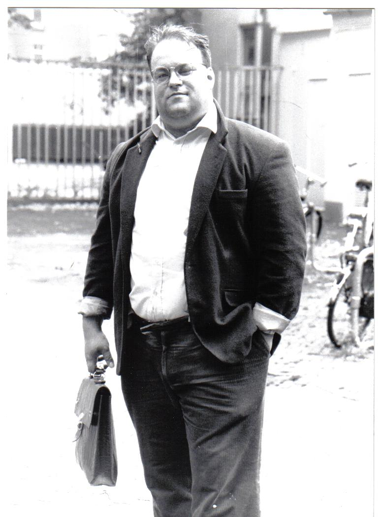 Portret van Piet van der Weijden, 1992